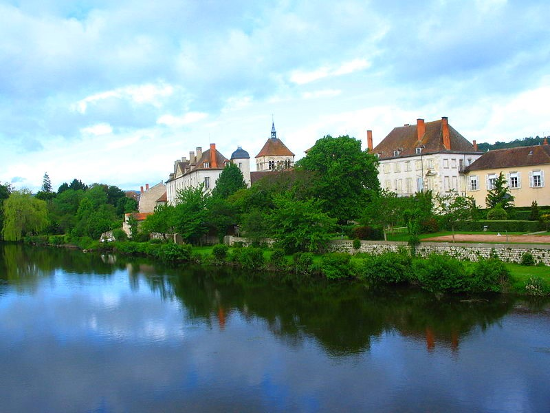 Ébreuil (Allier), arrosée par la Sioule. Le clocher de l'abbatiale et le site de l'ancienne abbaye vus du pont.